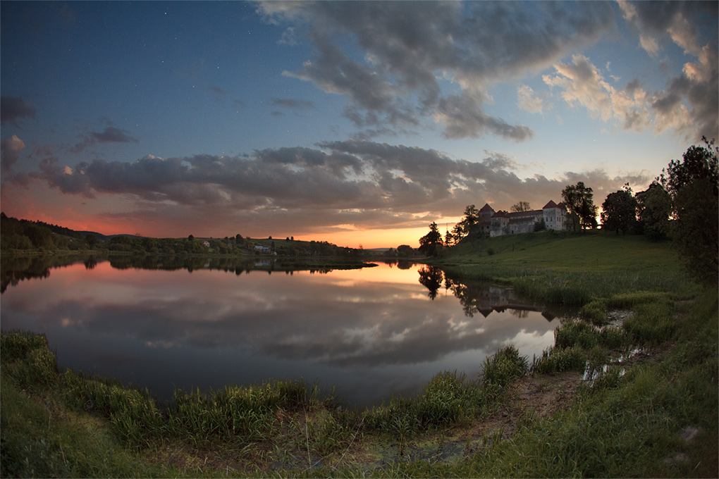 Замок (мур.), с. Свірж, Перемишлянський район, Львівська область